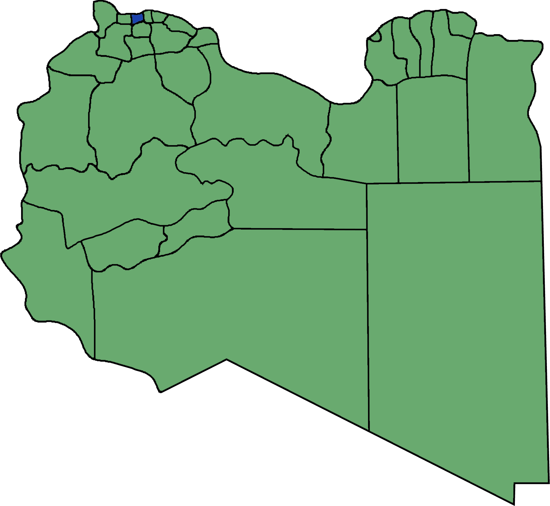 Die neuen Gemeinden (Munizipien) in Libyen. Az Zawiyah hervorgehoben.